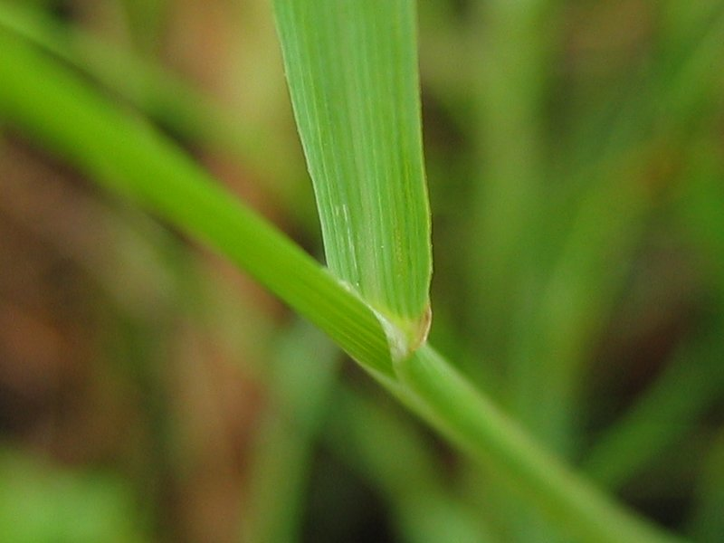 Gewöhnlicher Salzschwaden Puccinellia distans, Zingst